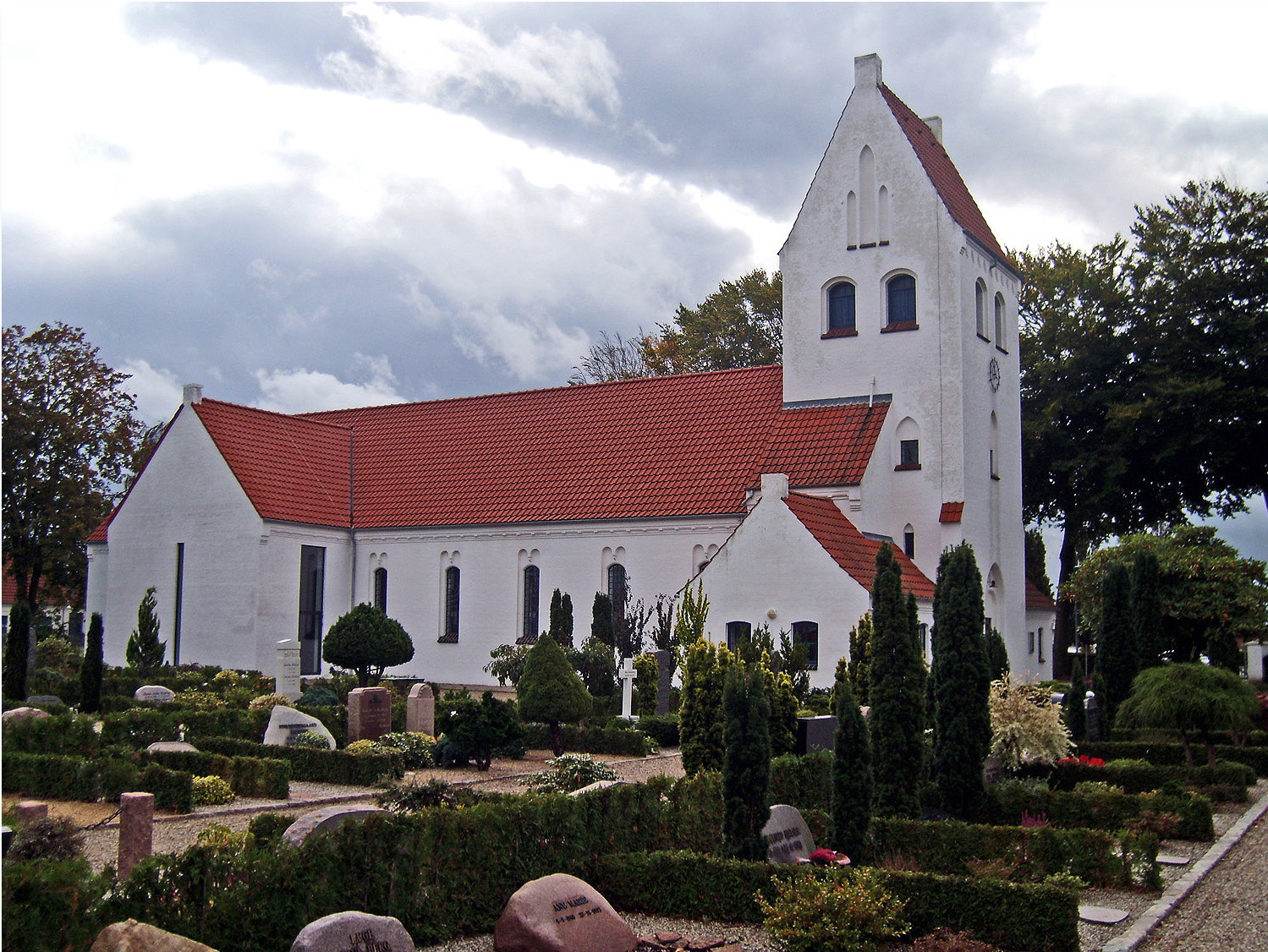 fra nordvest